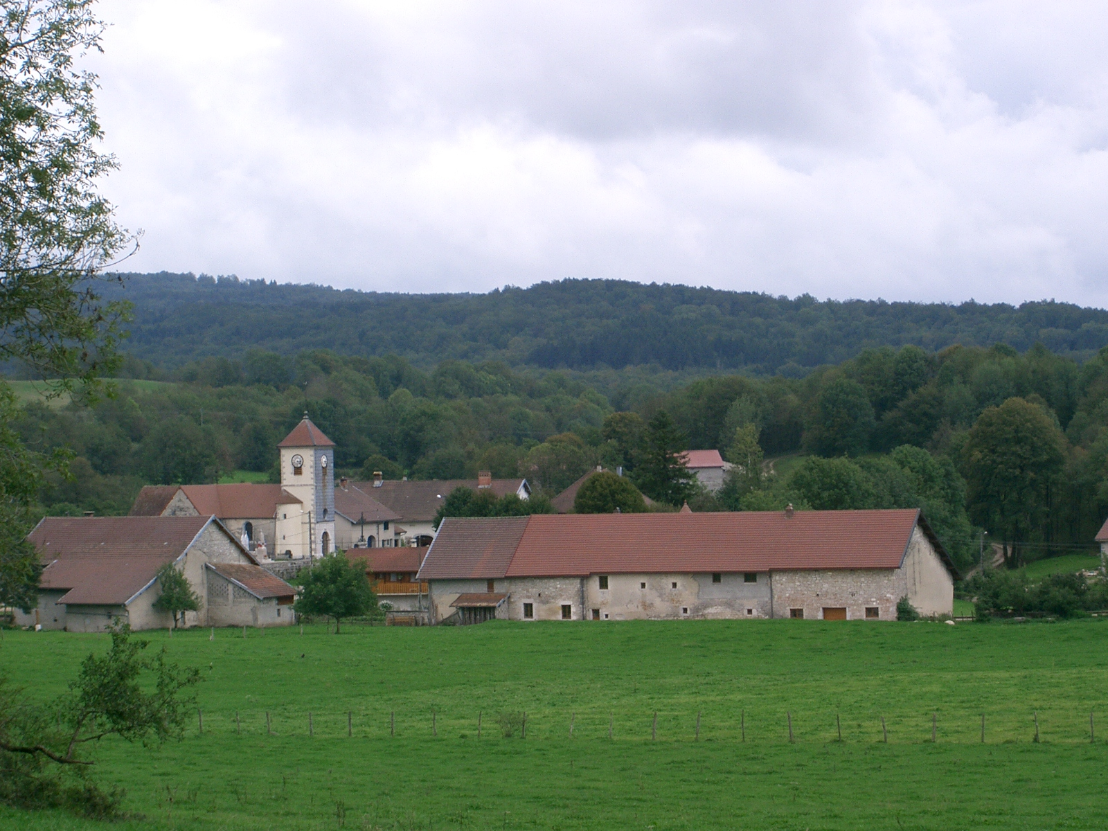 une partie du village de Saffloz (Jura) - France self made PRA